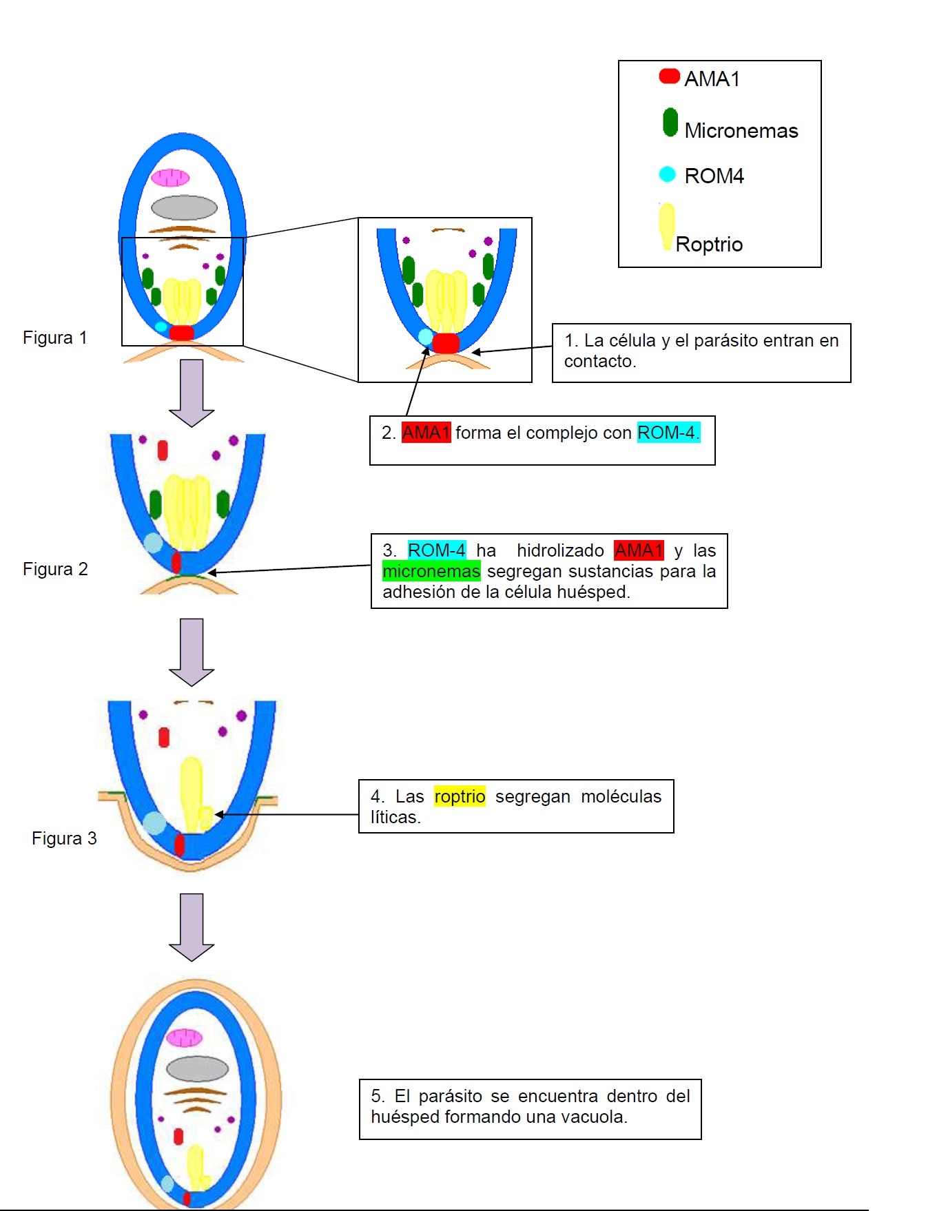 Es la descripción gráfica del mecanismo de invasión de los parásitos Apicomplexa